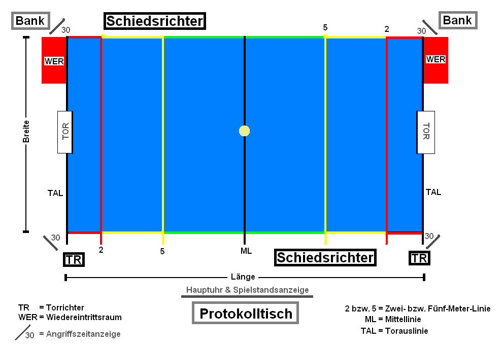 Spielfeldaufbau eines Wasserballspielfeldes, das in dieser Version seit dem 1. Oktober 2005 bespielt wird. Es sind außerdem noch alle Beteiligten Personen an ihren entsprechenden Plätzen mit aufgeführt.